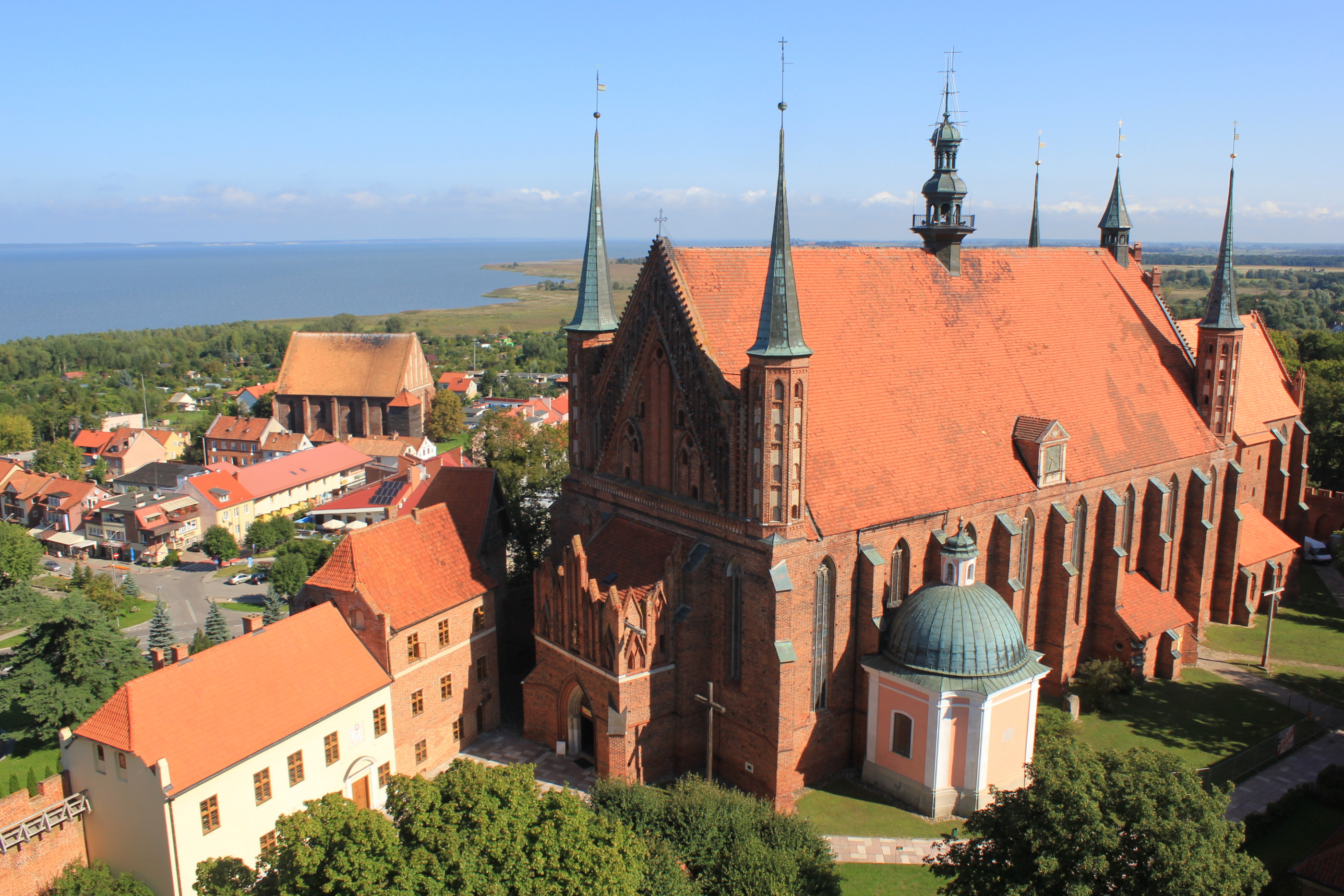 Blick auf den Frauenburger Dom vom Glockenturm aus.